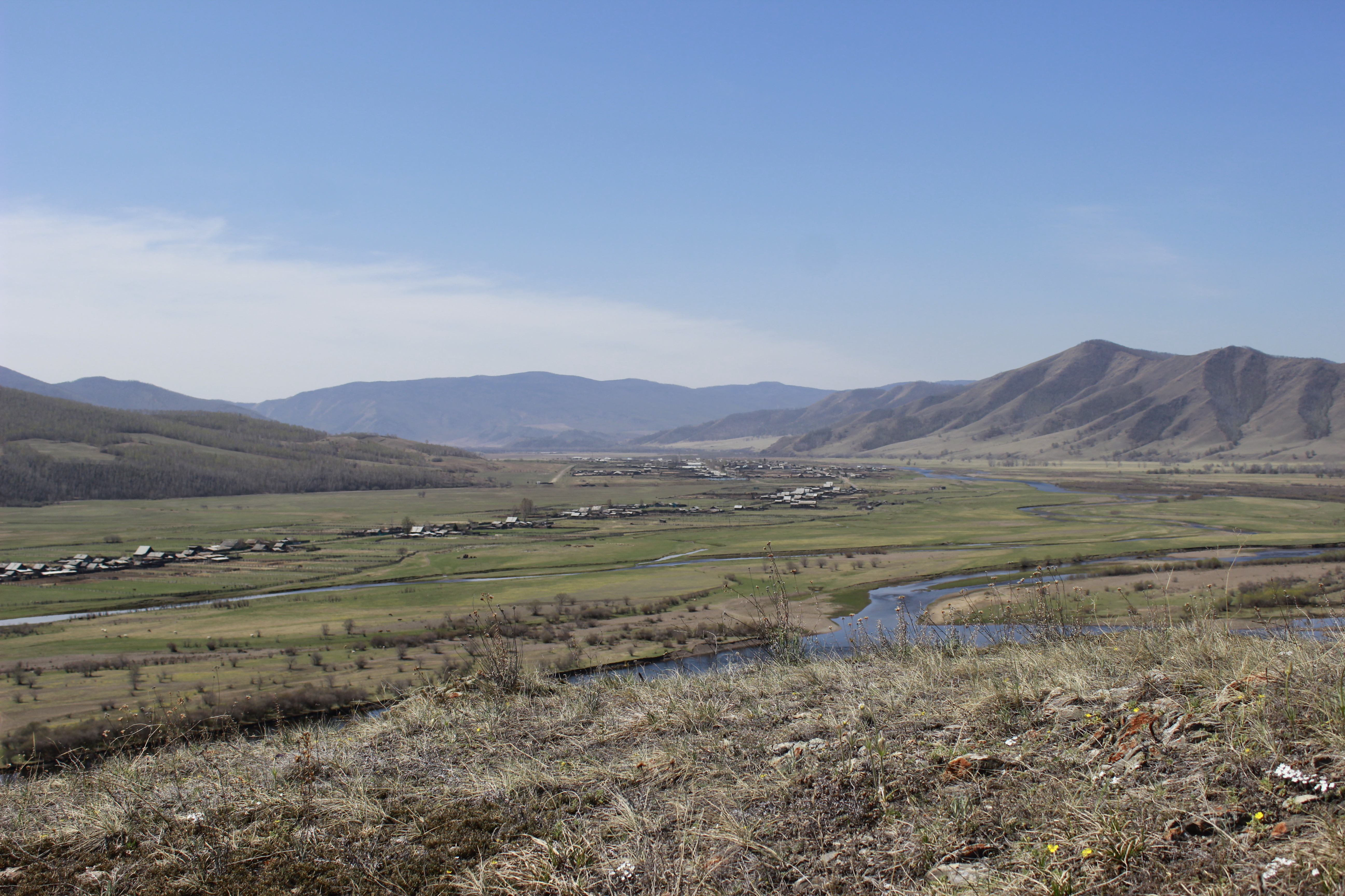 Окрестности села Желтура Джидинского района Бурятии